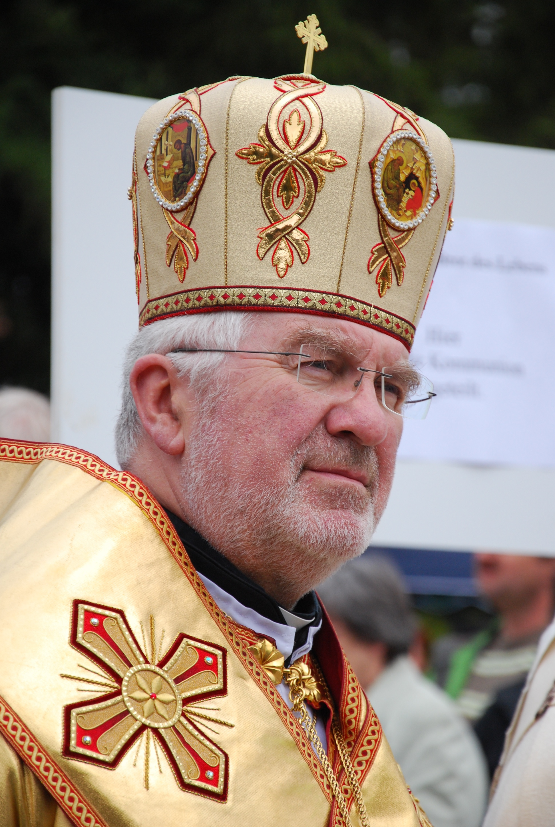 Petro Kryk, der Apostolische Exarch der Apostolischen Exarchie für katholische Ukrainer des byzantinischen Ritus in Deutschland und Skandinavien während der Bistumswallfahrt der Diözese Magdeburg am 6. September 2009 im Kloster Huysburg